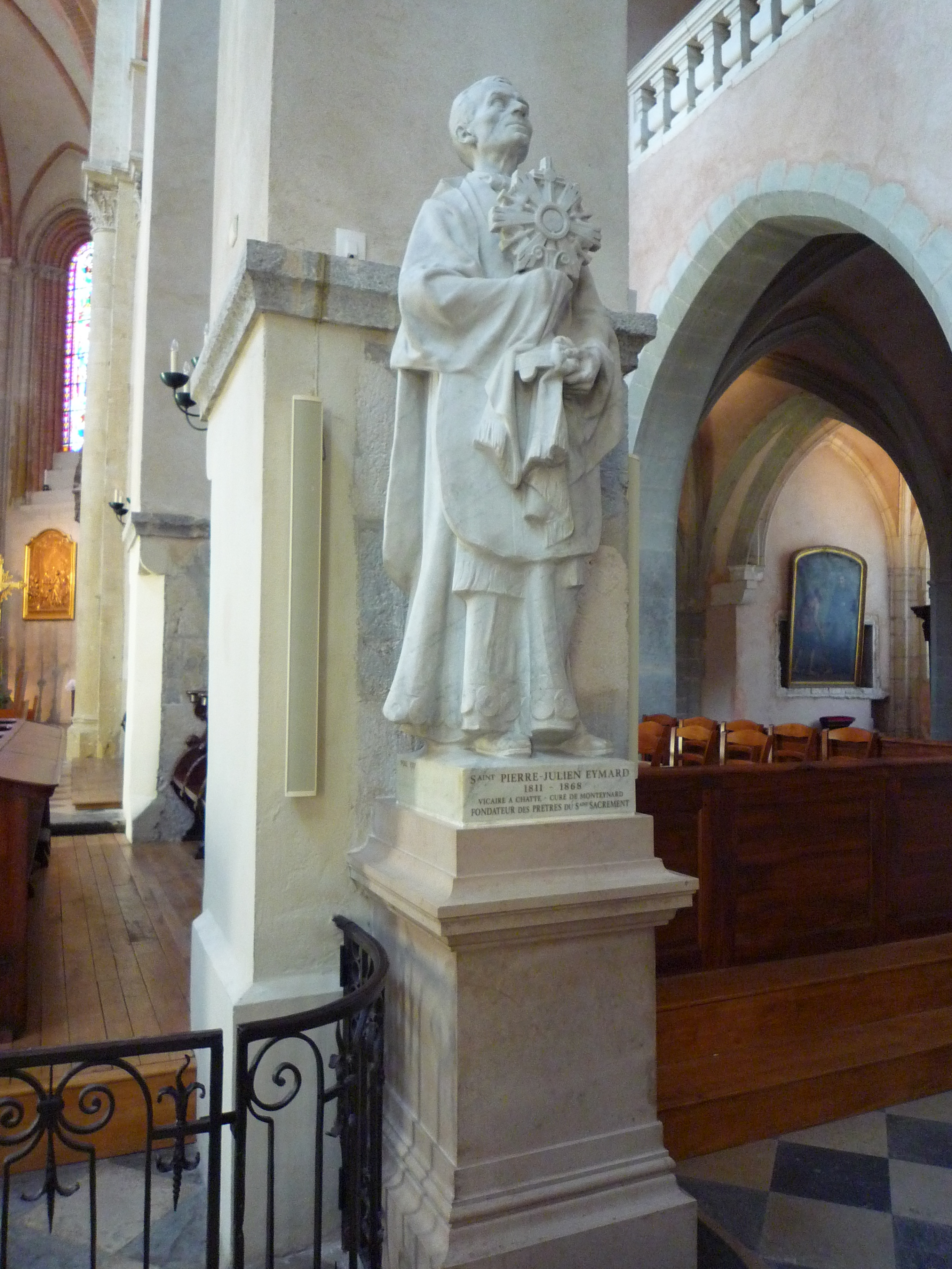 Statue du père Pierre-Julien_Eymard (1811-1868) dans la cathédrale de Grenoble.